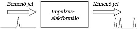 Az impulzus-alakformáló elvi ábrája